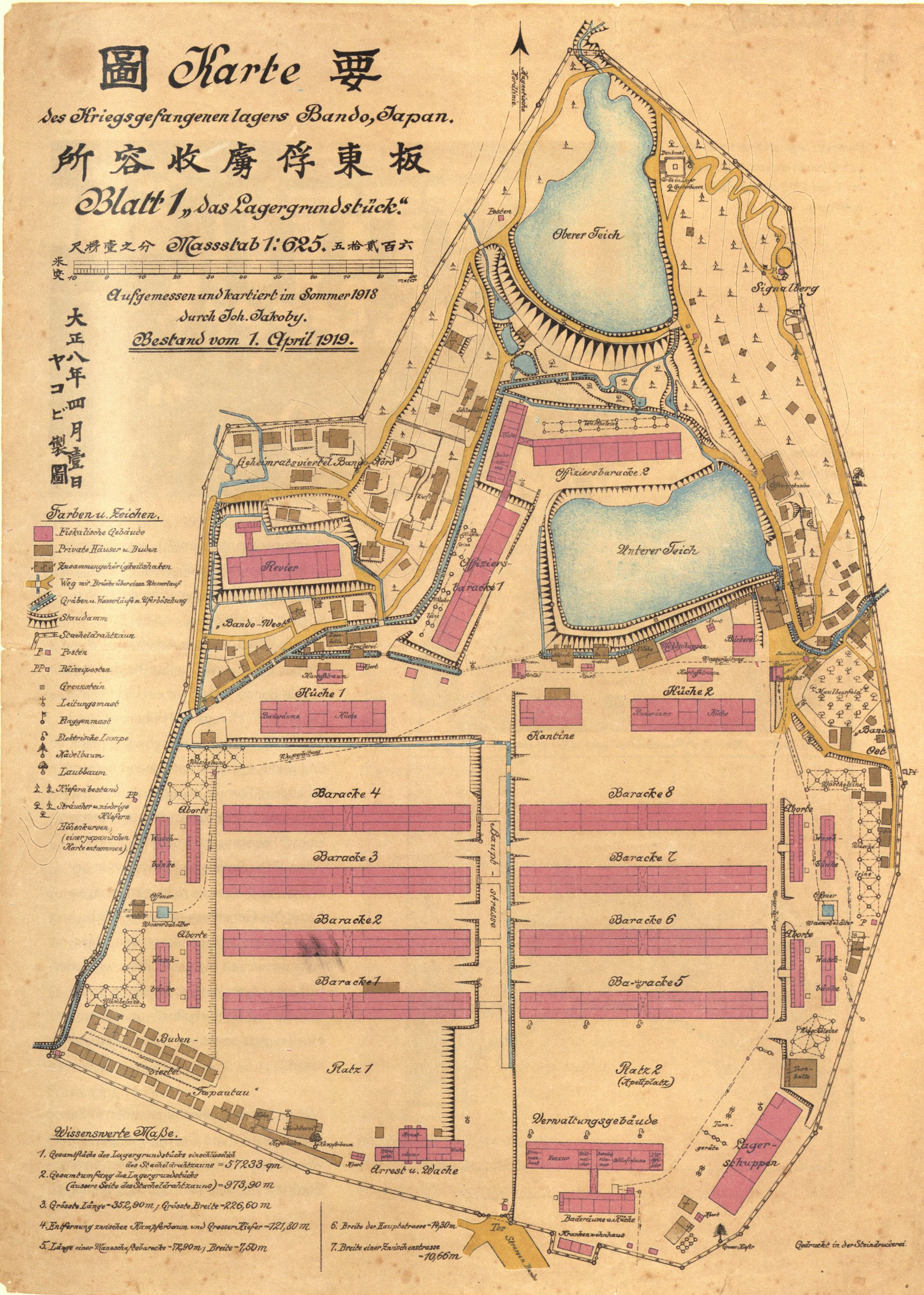 Karte des Kriegsgefangenenlagers Bando, Japan, 1919. Die Karte entstand als Lithographie in der Steindruckerei des Kriegsgefangenenlagers auf Basis einer Zeichnung von Johan Jakoby von 1918.